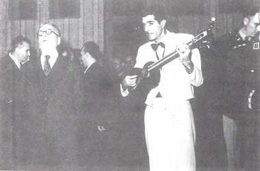 باشگاه افسران تبریز